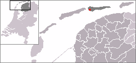 Locatie van Hollum, zelf gemaakt uit sjabloon van Wikipedia-gebruiker Mtcv